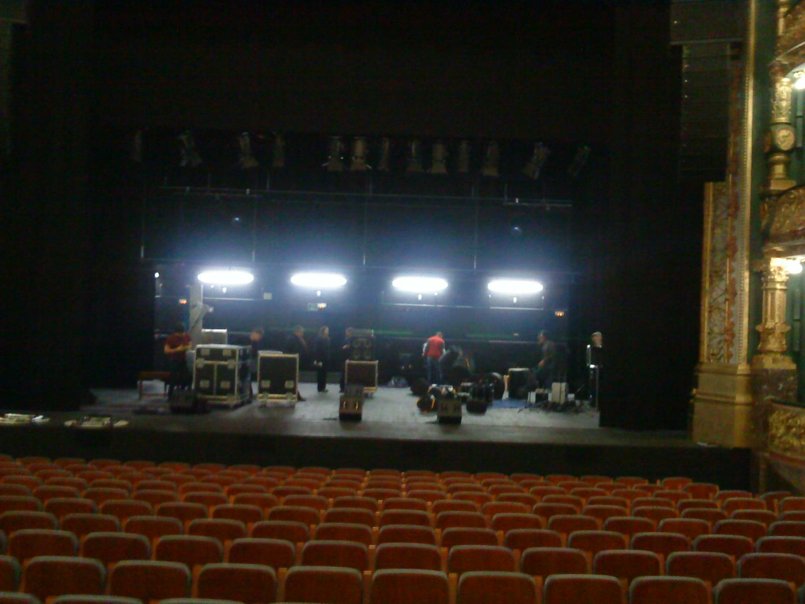 Vista del escenario desde el patio de butacas del teatro Arteria Campos Elíseos Antzokia de Bilbao, Vizcaya (País Vasco, España)